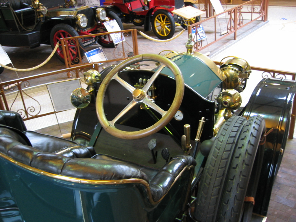 Peugeot Type 125 - Musée Peugeot de Sochaux